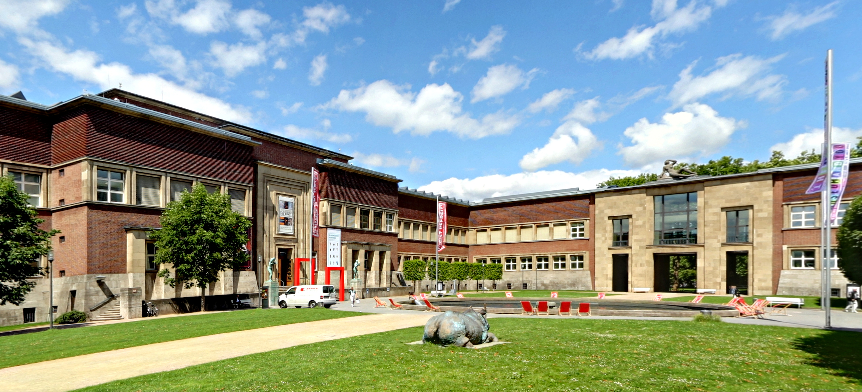 Museum Kunstpalast, Ehrenhof, Blick Richtung Norden auf den Innenhof mit Brunnen und dem Übergang („Triumpfbogen“) zwischen West- und Ostflügel. Vorne rechts liegt die Bronze-Skulptur „Nashorn“ von Johannes Brus.